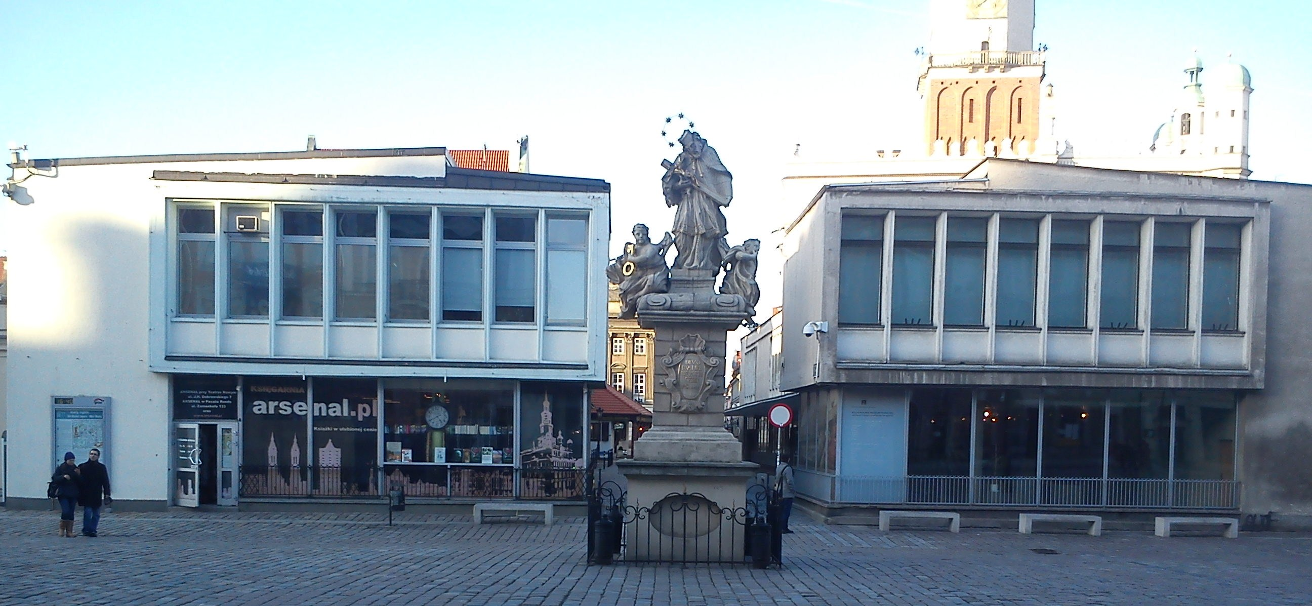 BWA i Muzeum Wojskowe, Poznań.